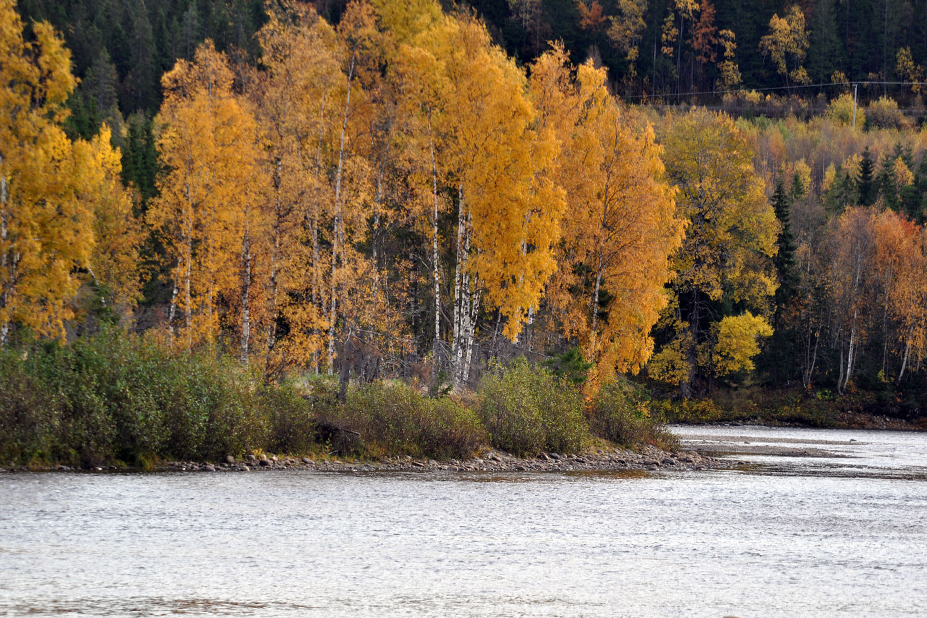 Foto: Oddvar Moa